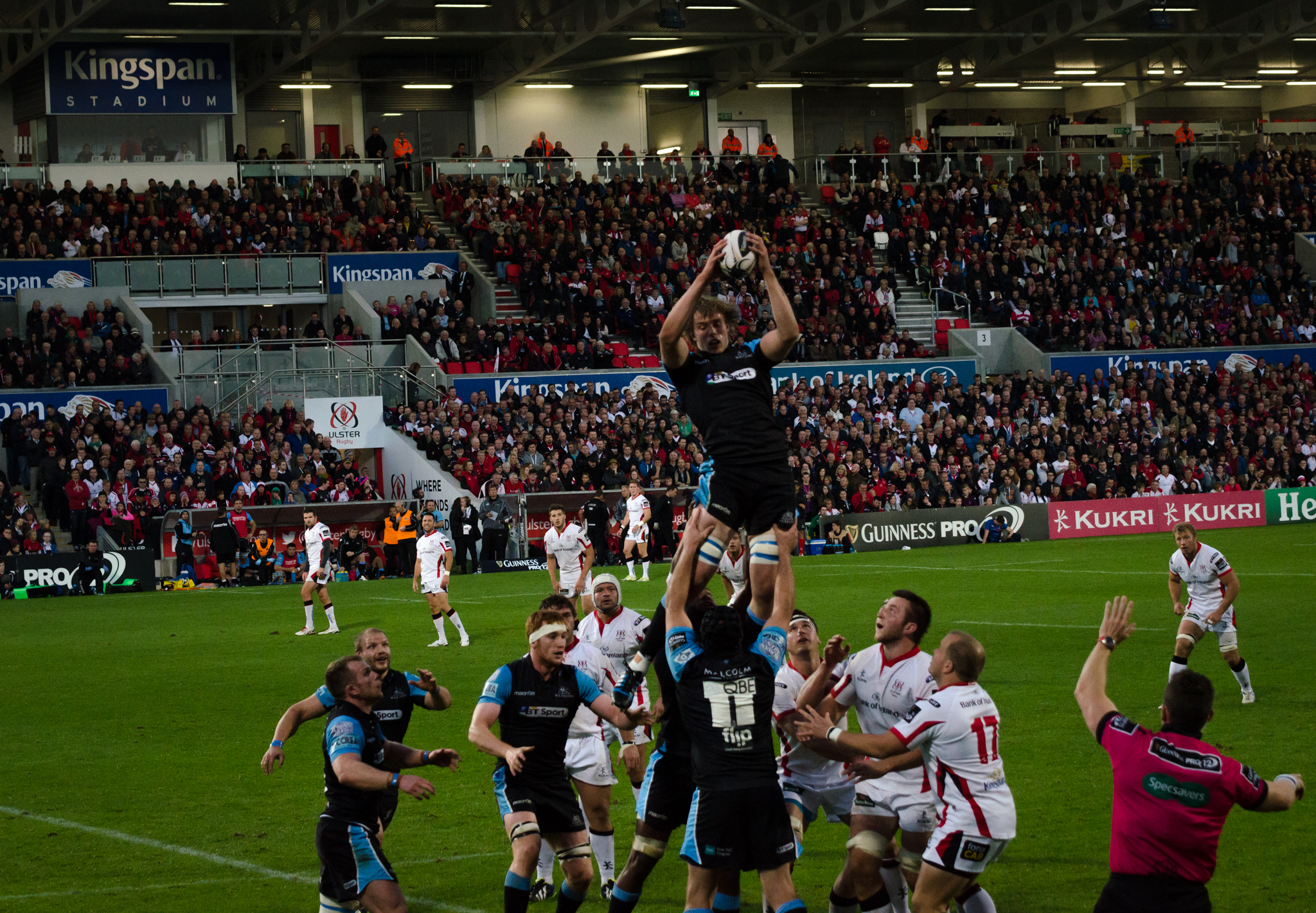 Ulster v Glasgow